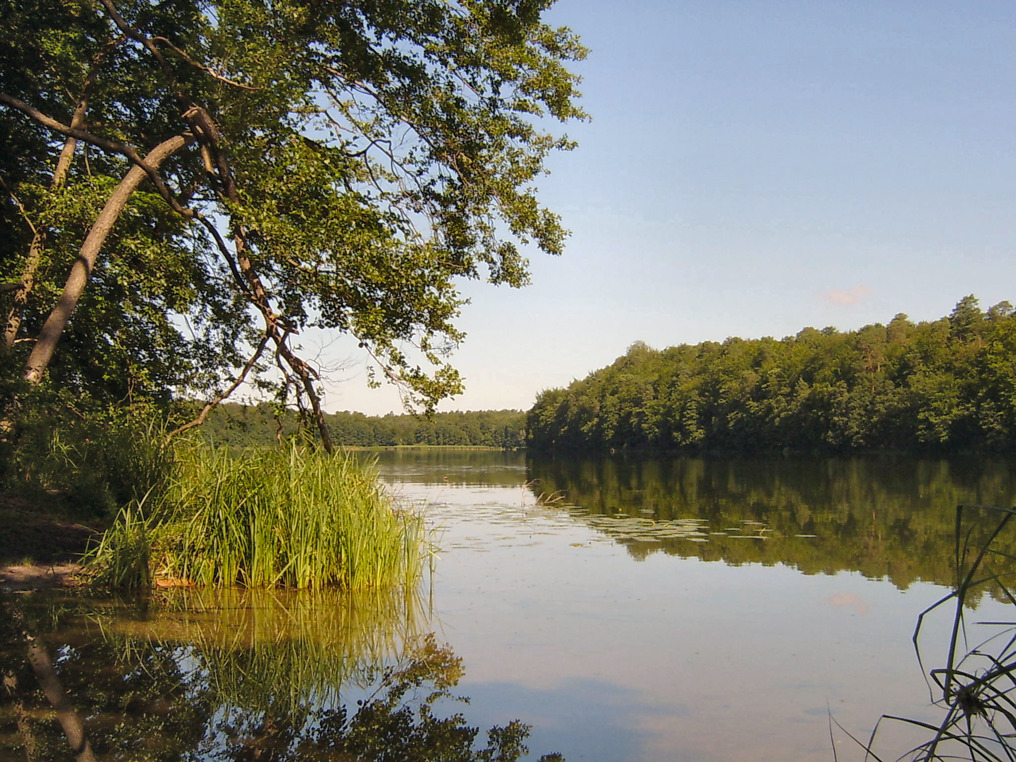 Jezioro Lubie obok miejscowości Lipy, gmina Kłodawa, woj. lubuskie, Poland